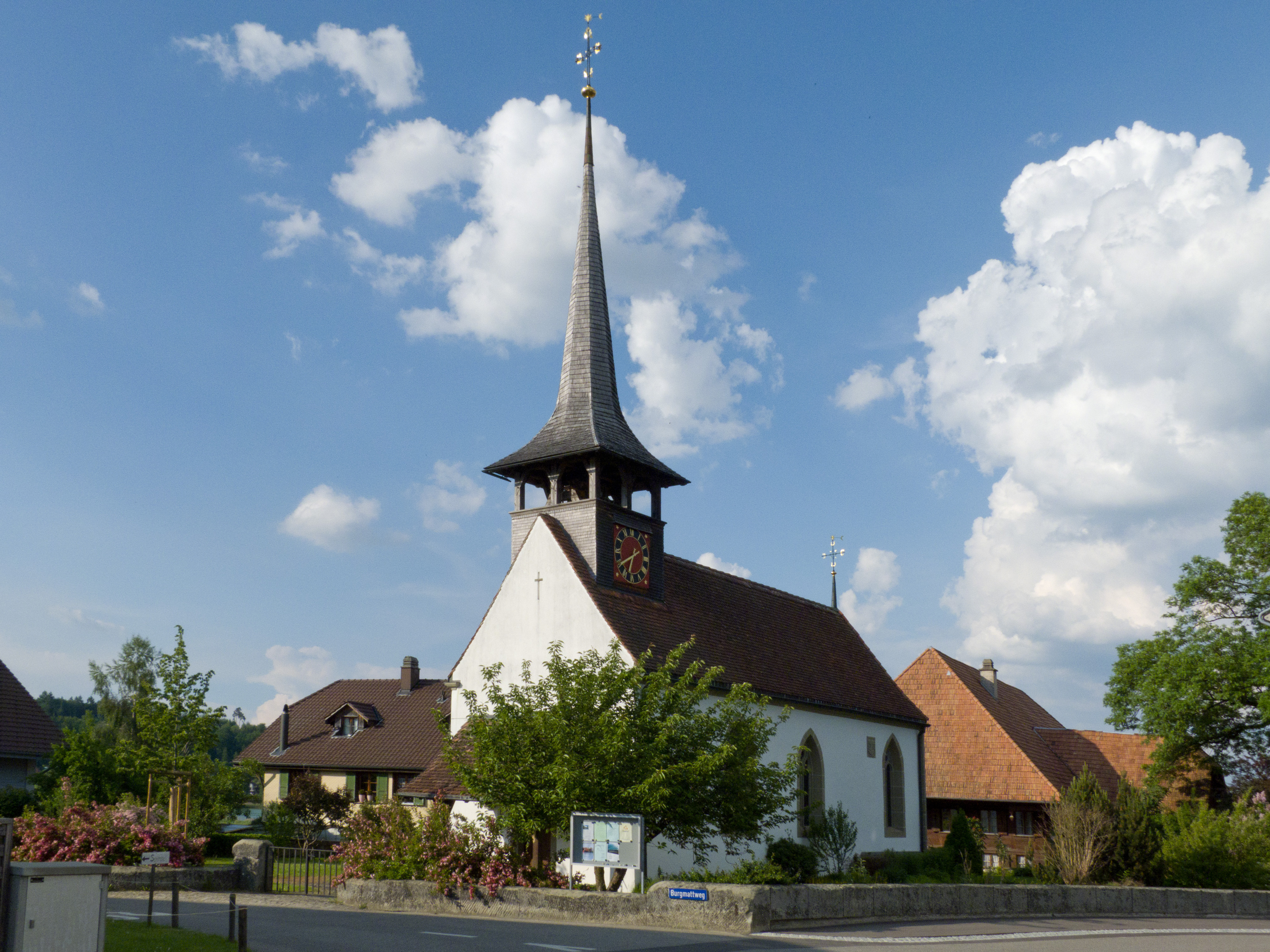 Ref. Kirche Moosseedorf,1520. Erstmals erwähnt 1242. Südwestansicht